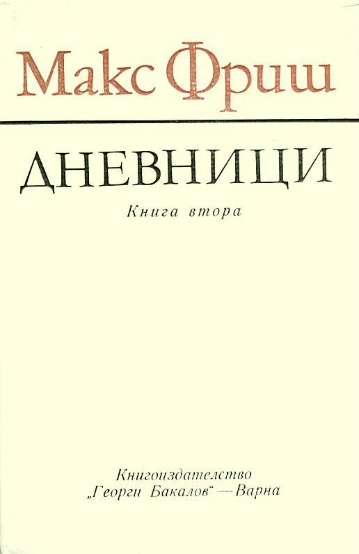 Макс Фриш, "Дневници" 1946-1949 (1979)